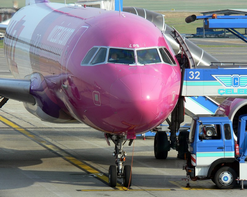 WizzAir A320-200 HA-LPB Ferihegyen, Budapest